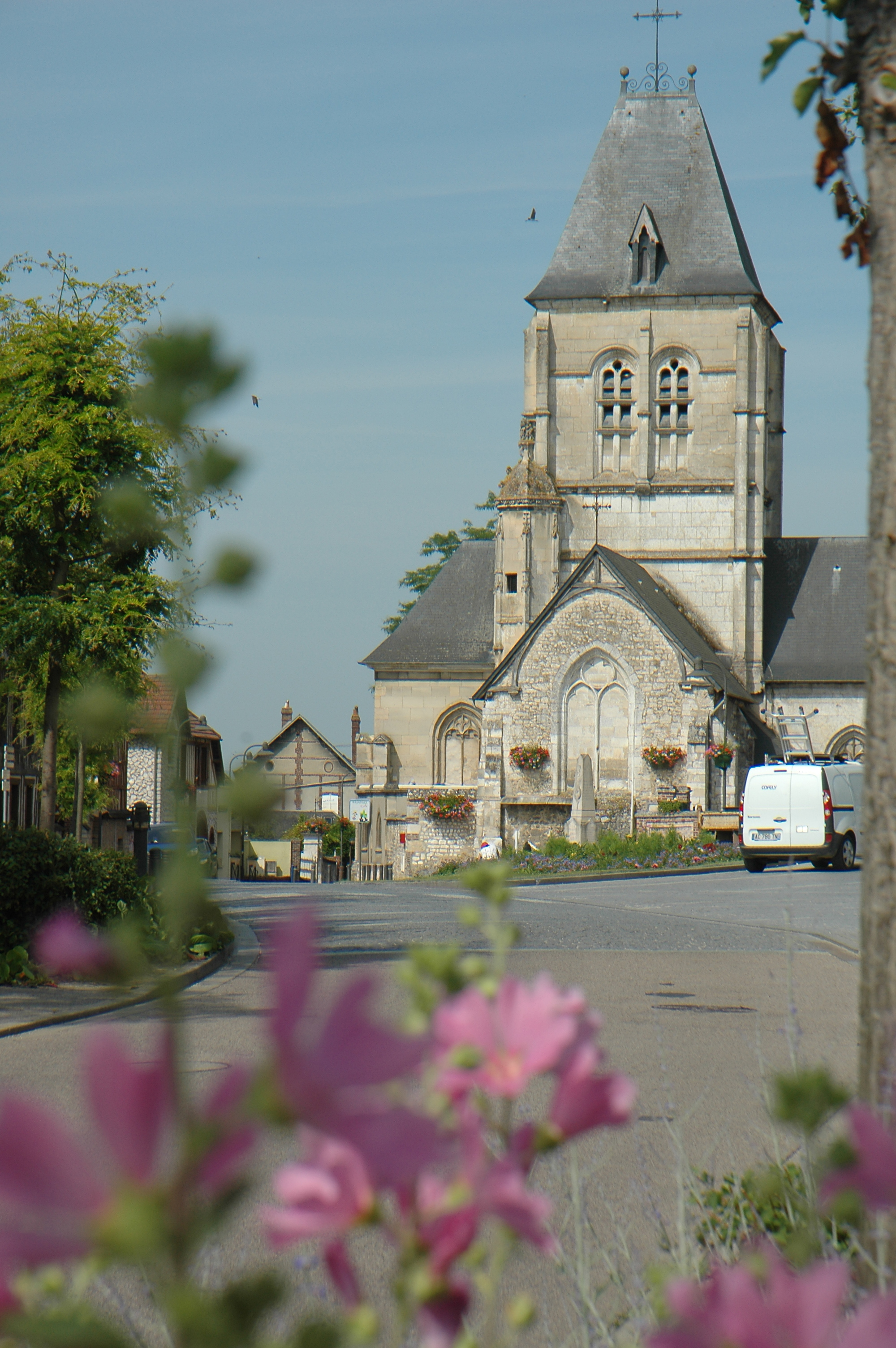 Eglise d'Alizay